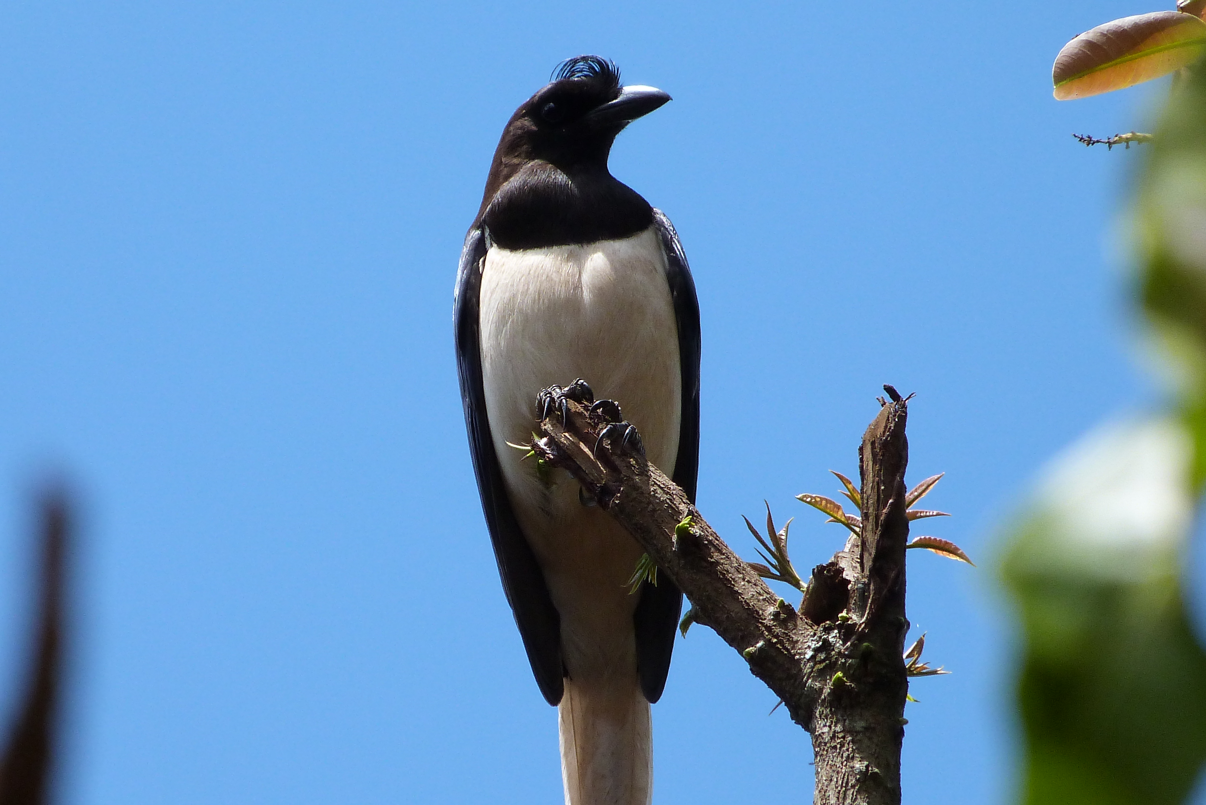 Foto tirada em Entre Rios - MG